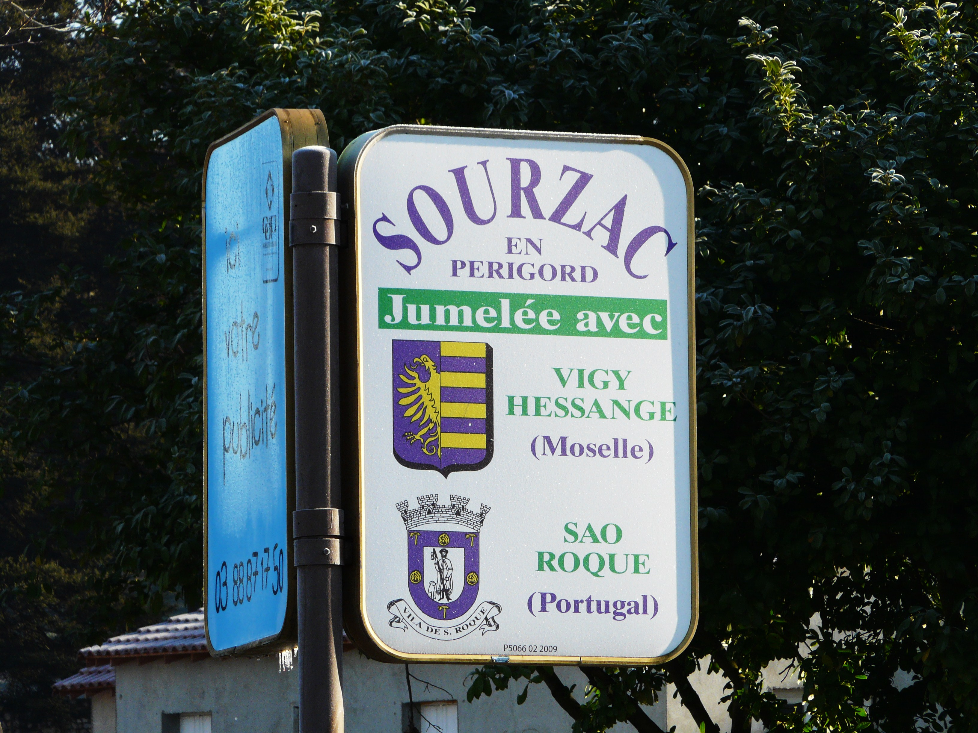 Panneau de jumelage de Sourzac, Dordogne, France.